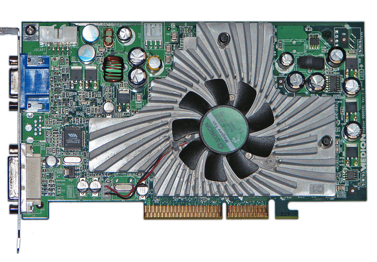 Beschreibung: ATI Radeon 9800 XXL (special Medion Version) Fotograf: Darkone, 8. Dezember 2005